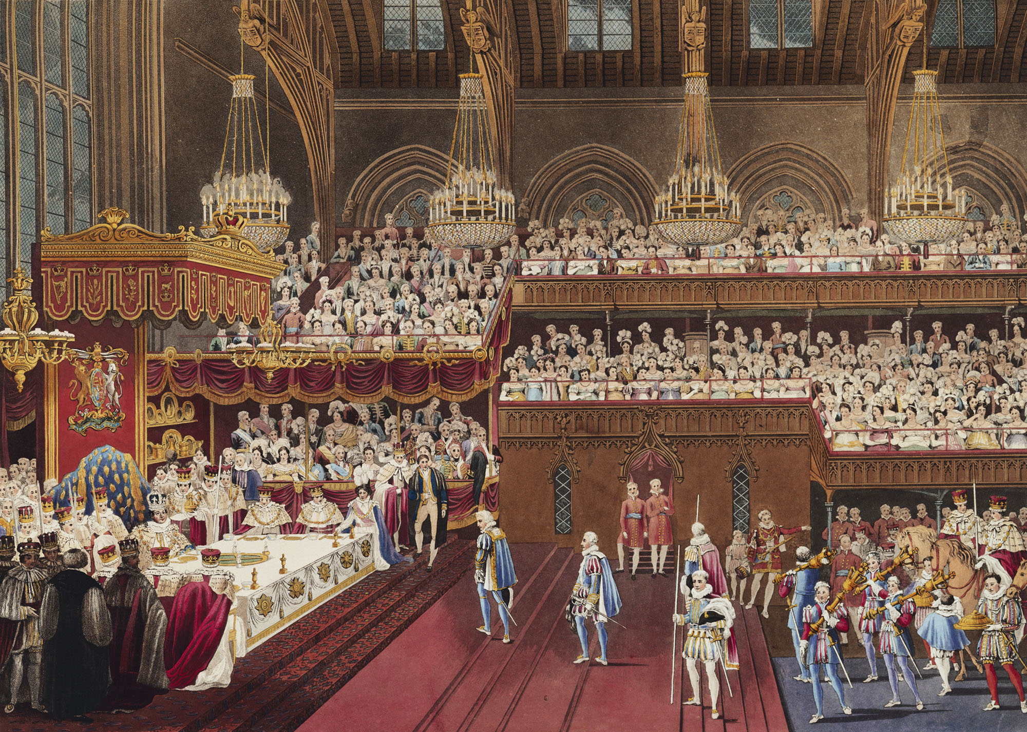 The Coronation of H.M. King George IV